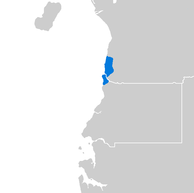 Idioma yassa